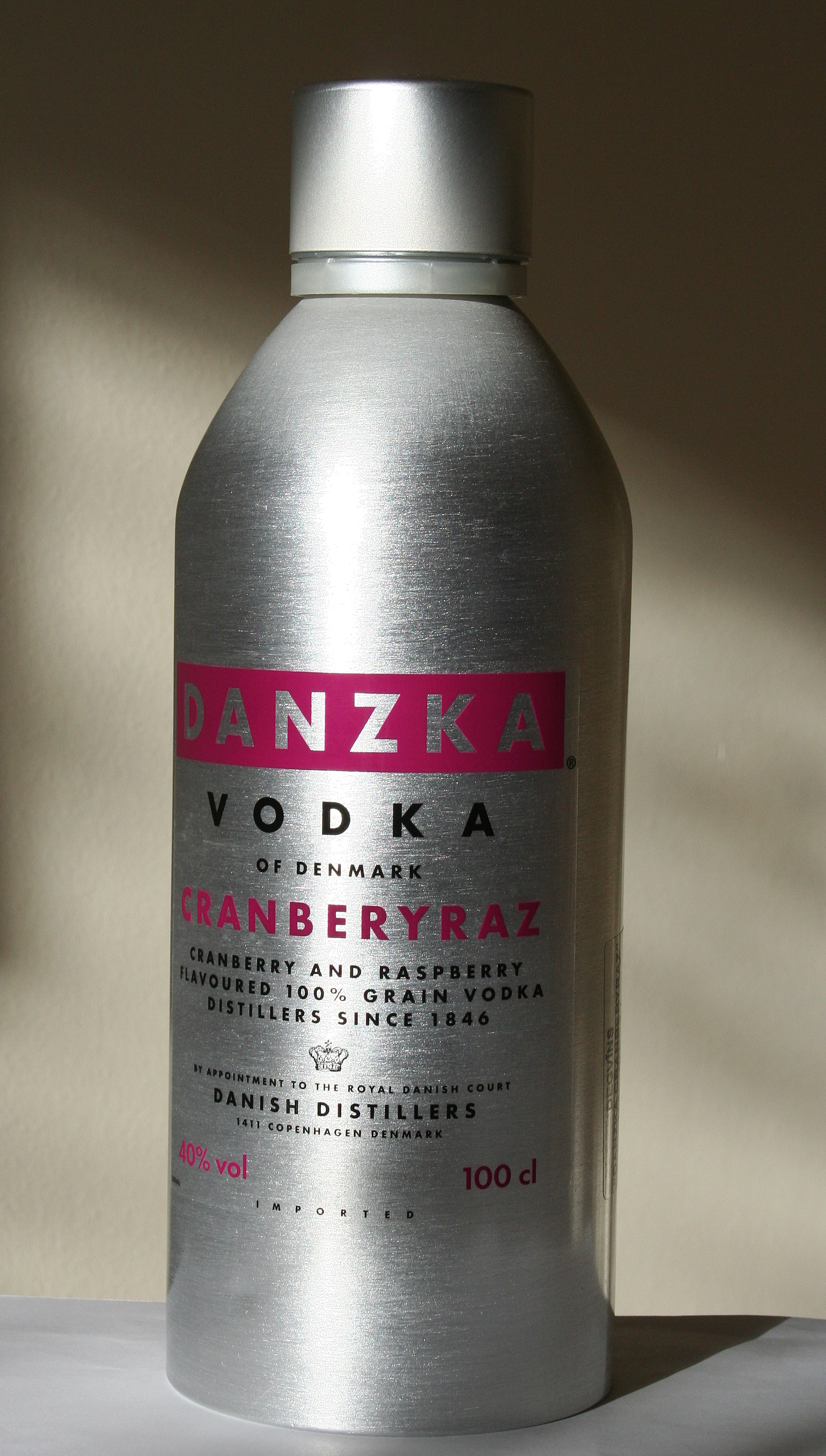 vodka danzka cranberyraz